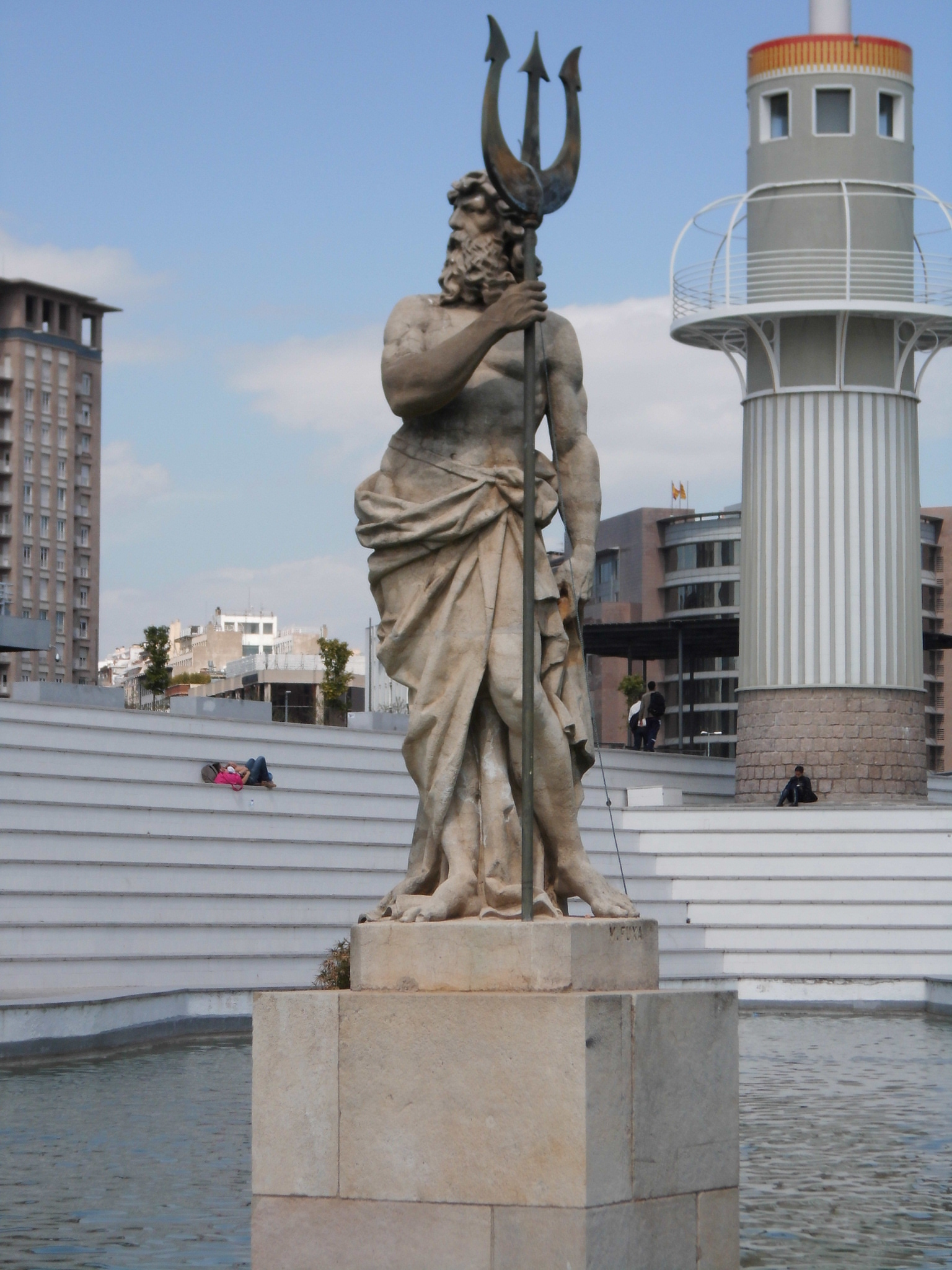 Neptú (Manel Fuxà). Parc de l'Espanya Industrial (Barcelona)